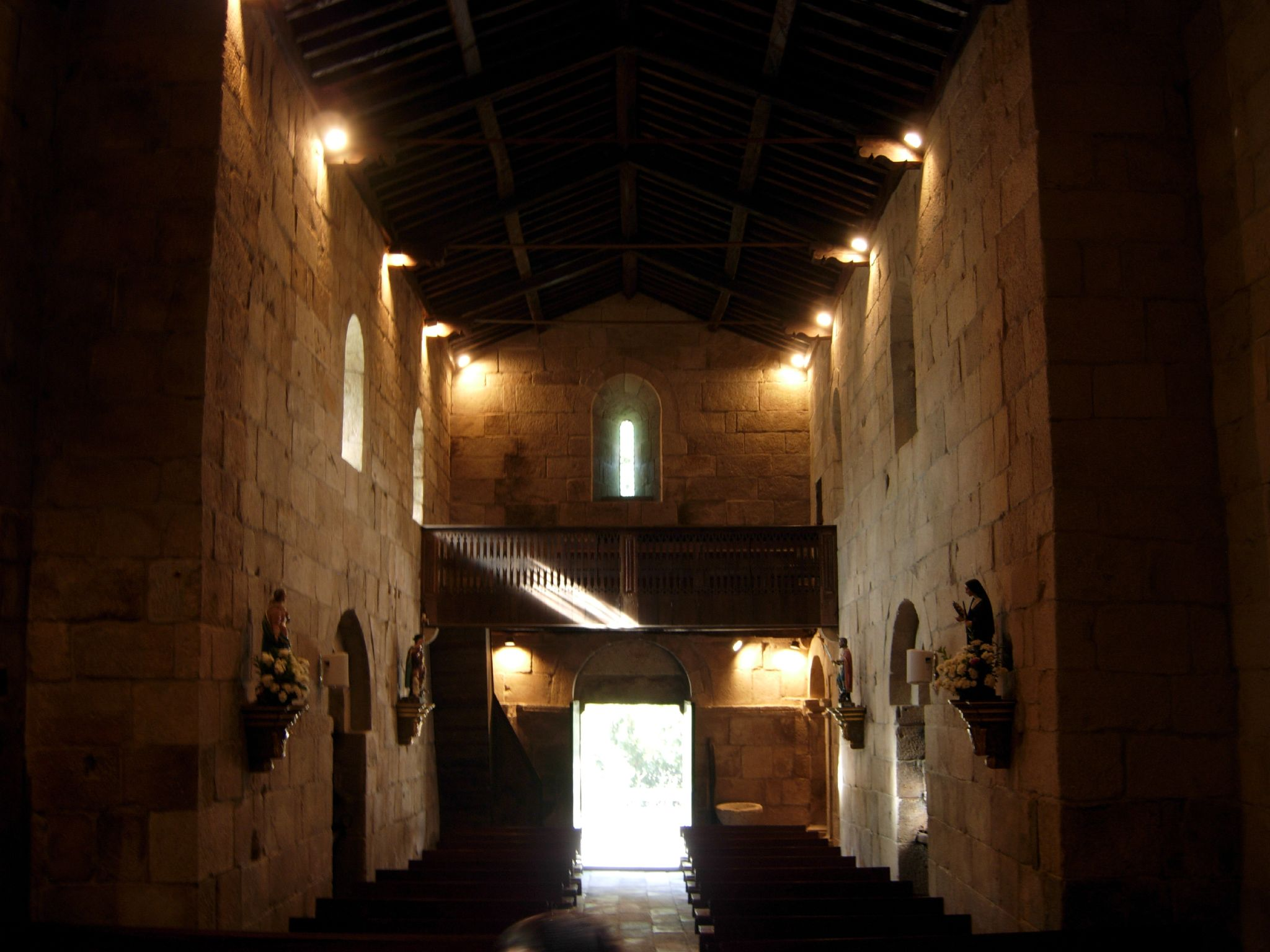 Vista del interior de la iglesia desde el altar.